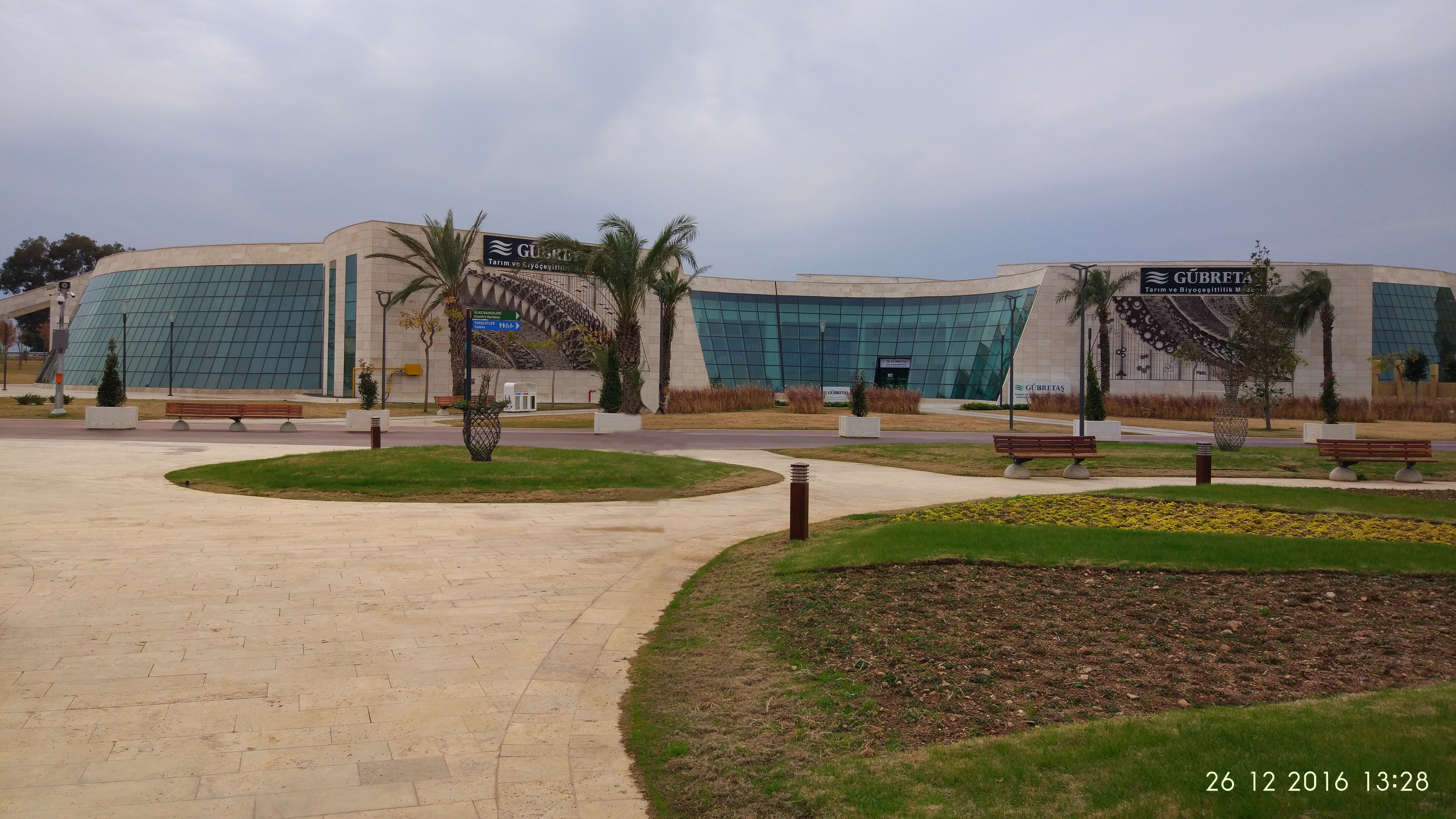 Tarım ve Biyoçeşitlilik Müzesi'nin önü.